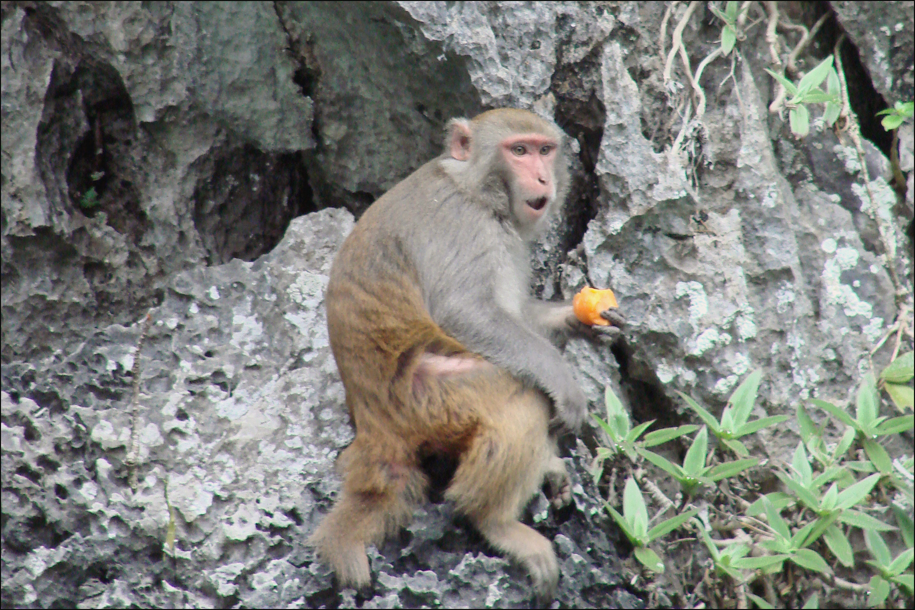 Située au Nord - est de Haiphong, la baie d’Halong fait partie du golfe du Tonkin. Elle s’étend sur une superficie de 1553 Km2 et est semée de milliers de roches calcaires au relief karstique. On y compte 1969 îles et îlots, la plupart non habités en raison de leur relief escarpé et donc préservés. Connue au Vietnam depuis plusieurs siècles comme le plus beau paysage du pays, la baie d’Halong a été classée au patrimoine mondial par l’Unesco en 1994.